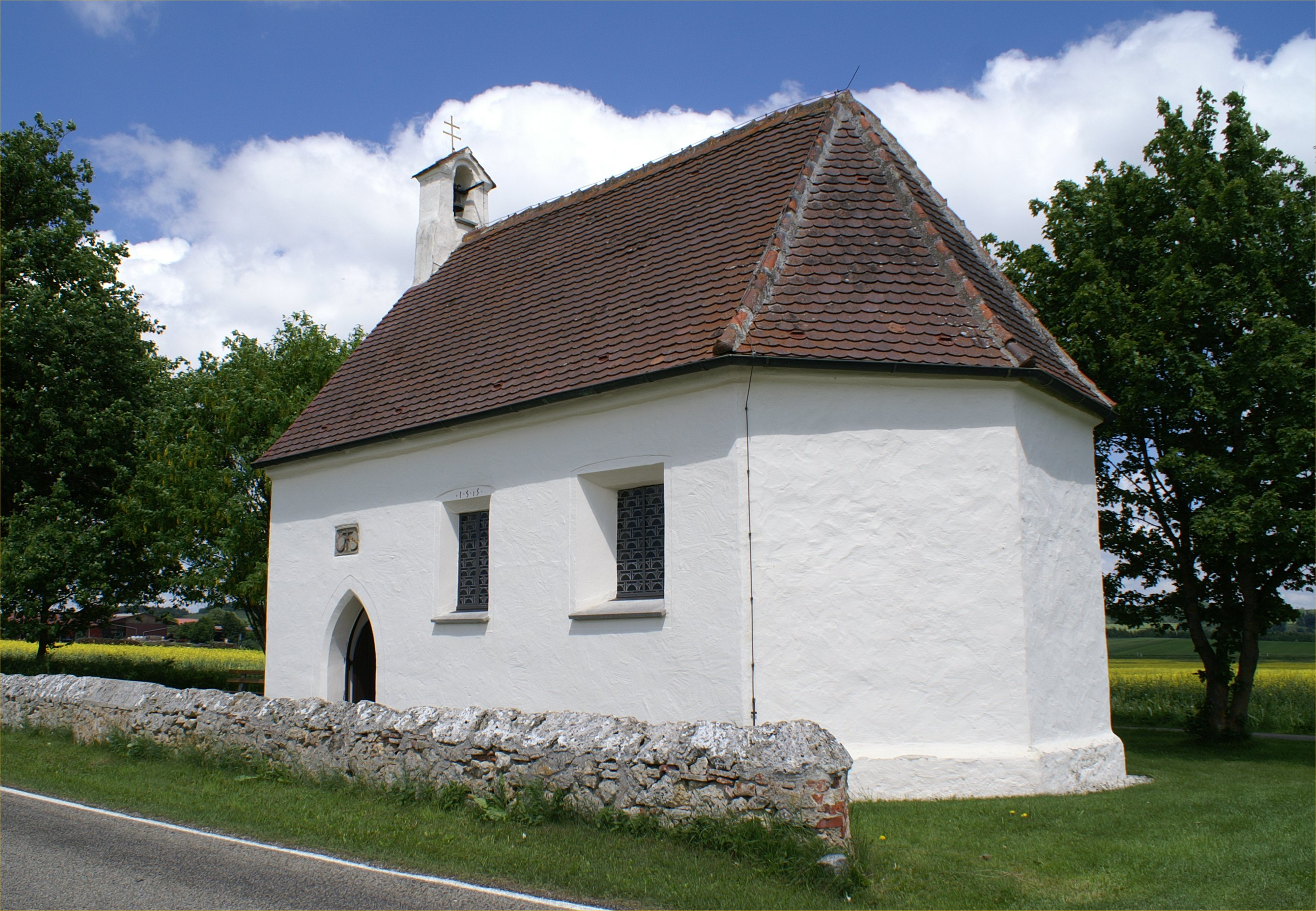 Kapelle mit der Jahreszahl 1515 an der Straße von Münsingen-Magolsheim im Landkreis Reutlingen nach Schelklingen-Ingstetten im Alb-Donau-Kreis